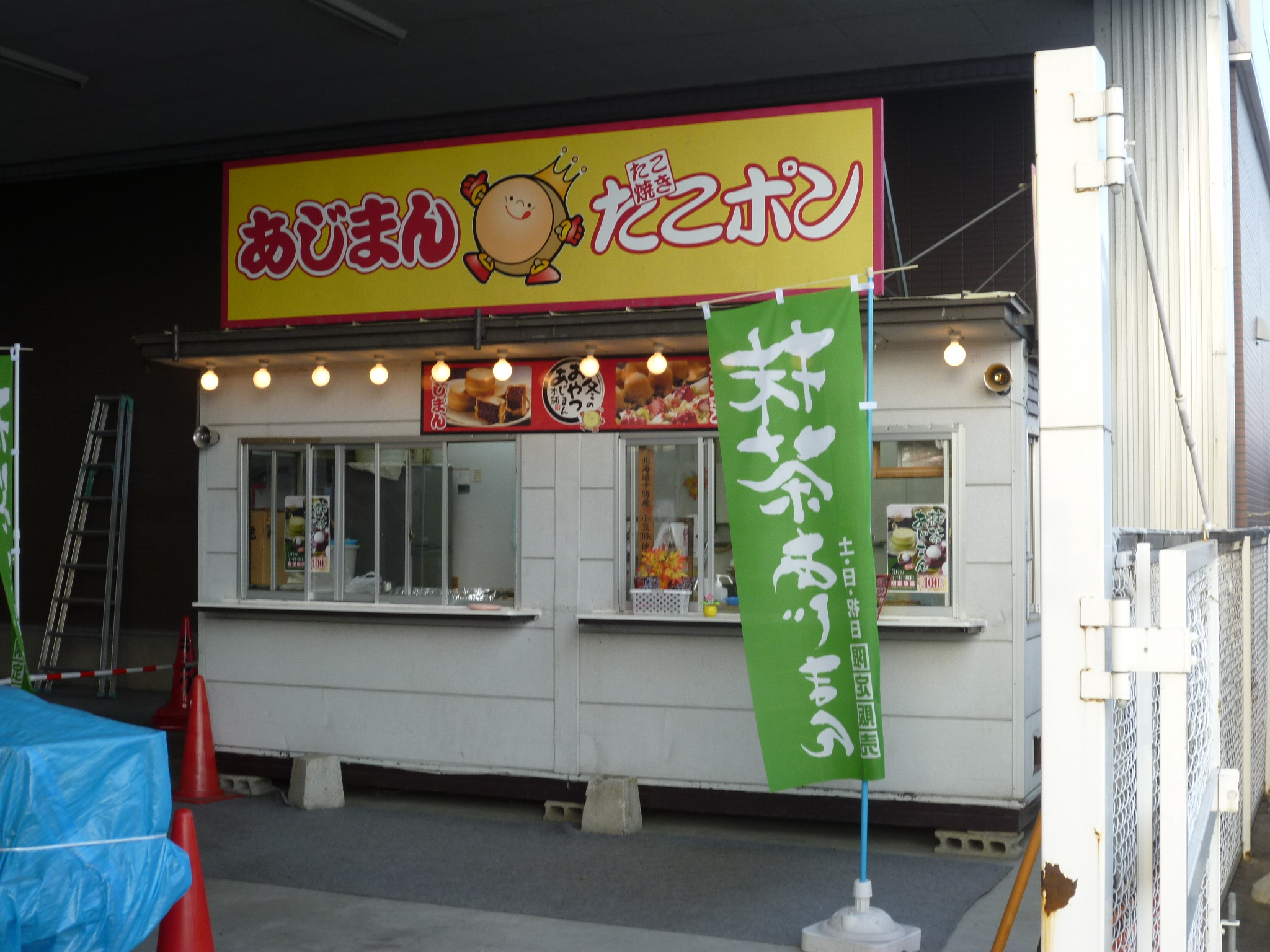 あじまん・たこポン店舗。 山形県新庄市で撮影。